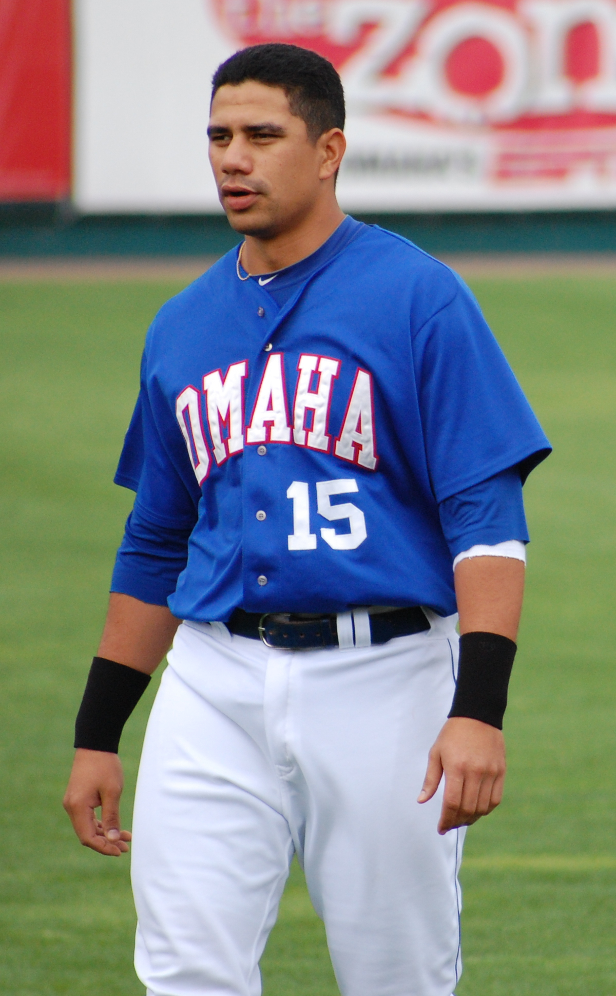 Kila Ka'aihue